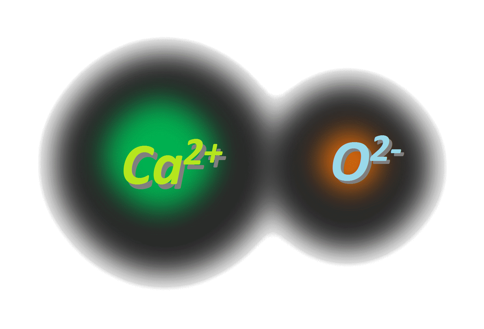 Molekülmodell von Calciumoxid